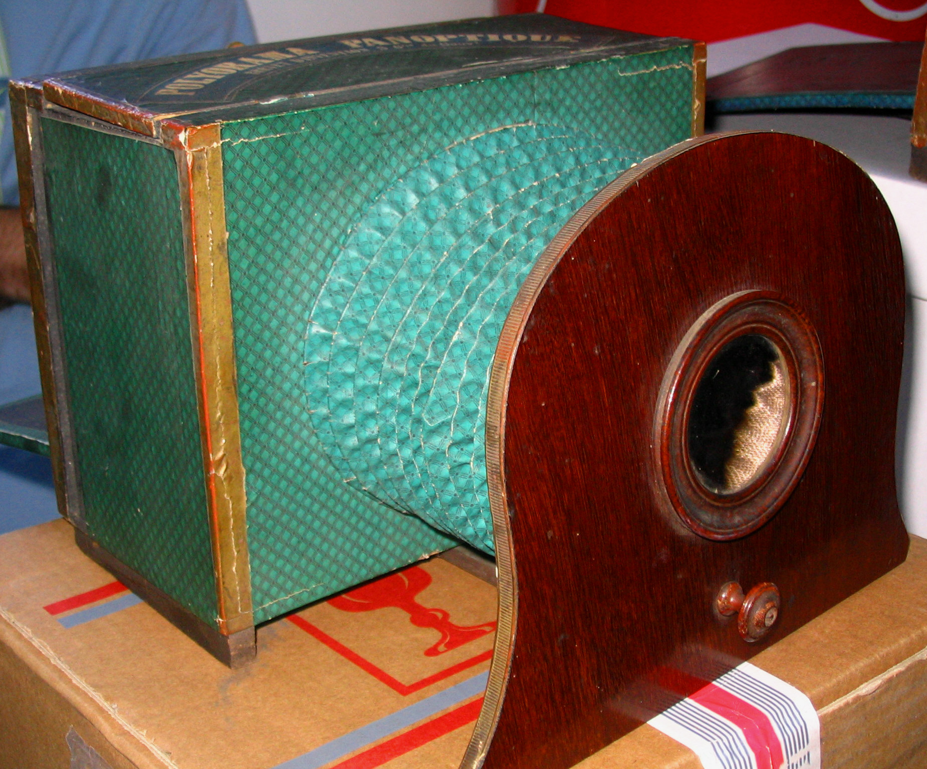 Polyorama panoptique par Louis Daguerre, Bry-sur-Marne, France